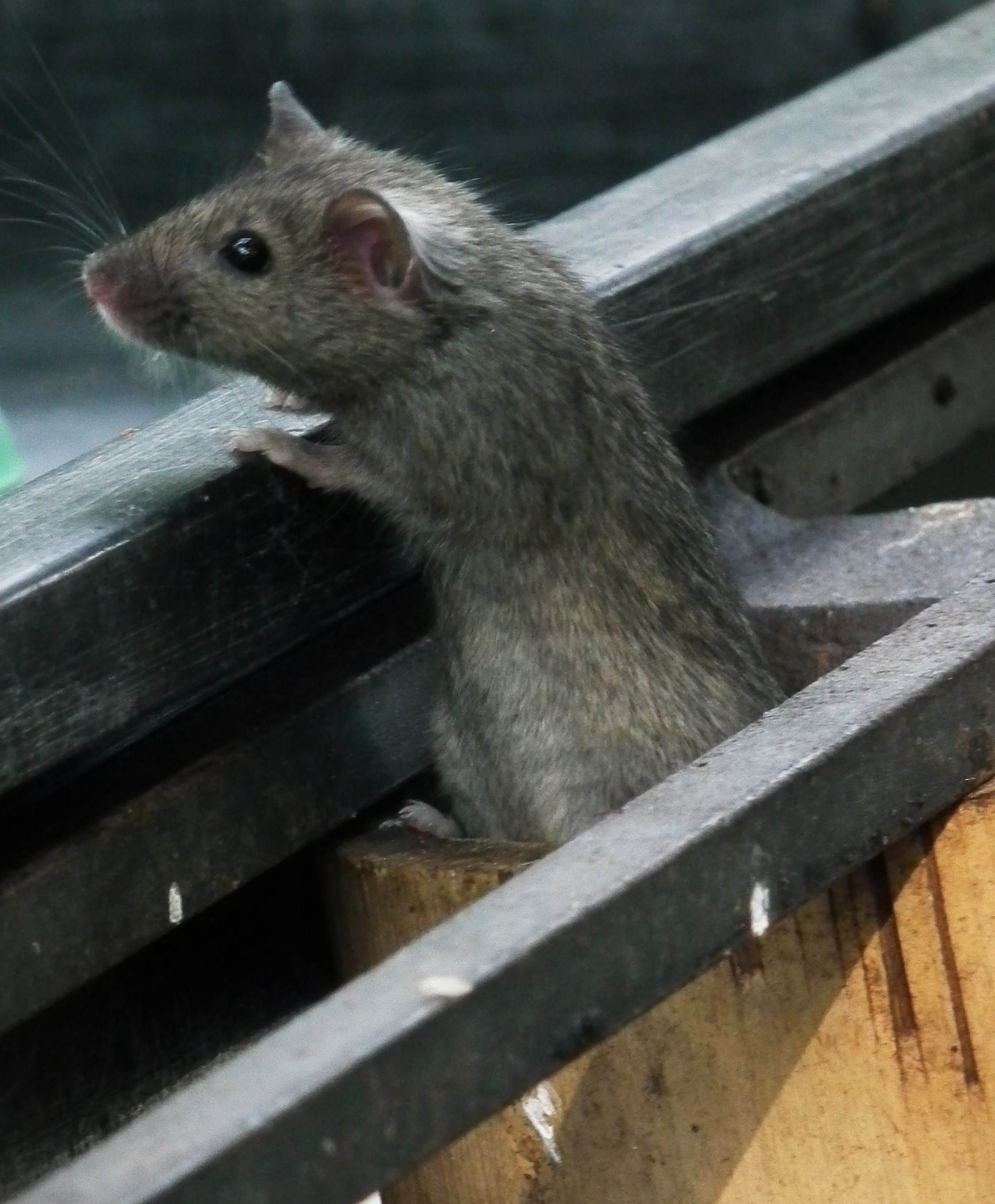 Hausmaus (Mus musculus), fotografiert im nördlichen Baden-Württemberg (Deutschland)